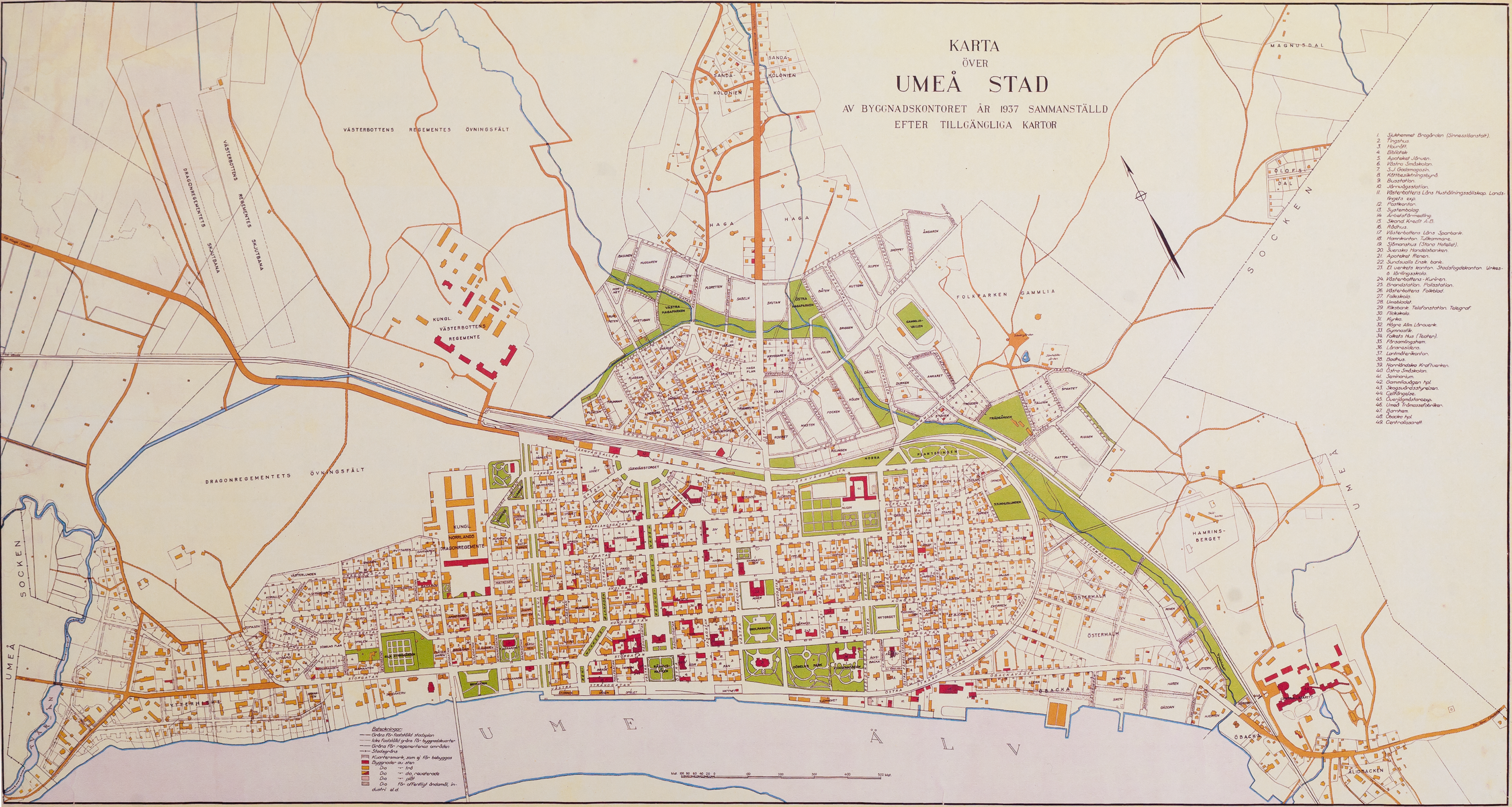 Kara över Umeå Stad av byggnadskontoret år 1937 sammanställd efter tillgängliga kartor.